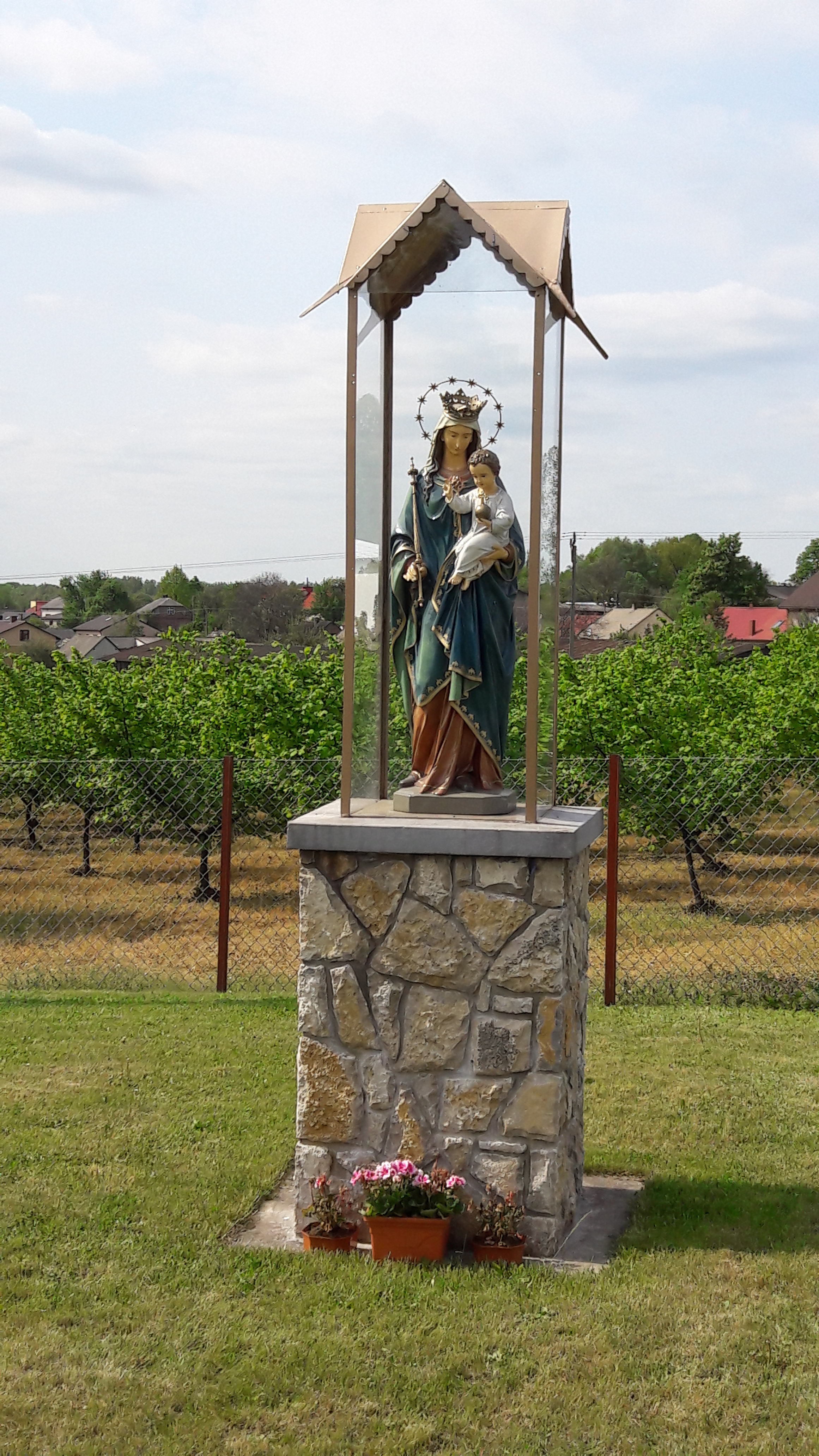 Matka Boska na Krzykawce, gmina Bolesław, powiat olkuski